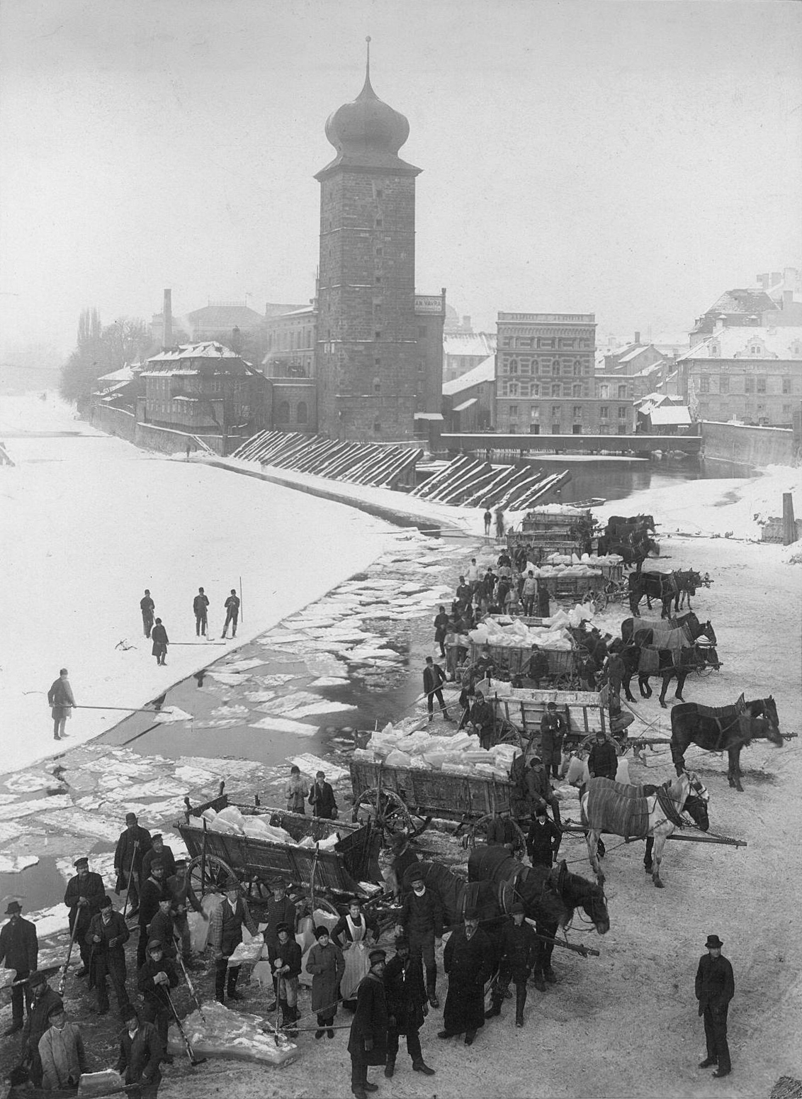 Ledování u Šítkovských mlýnů